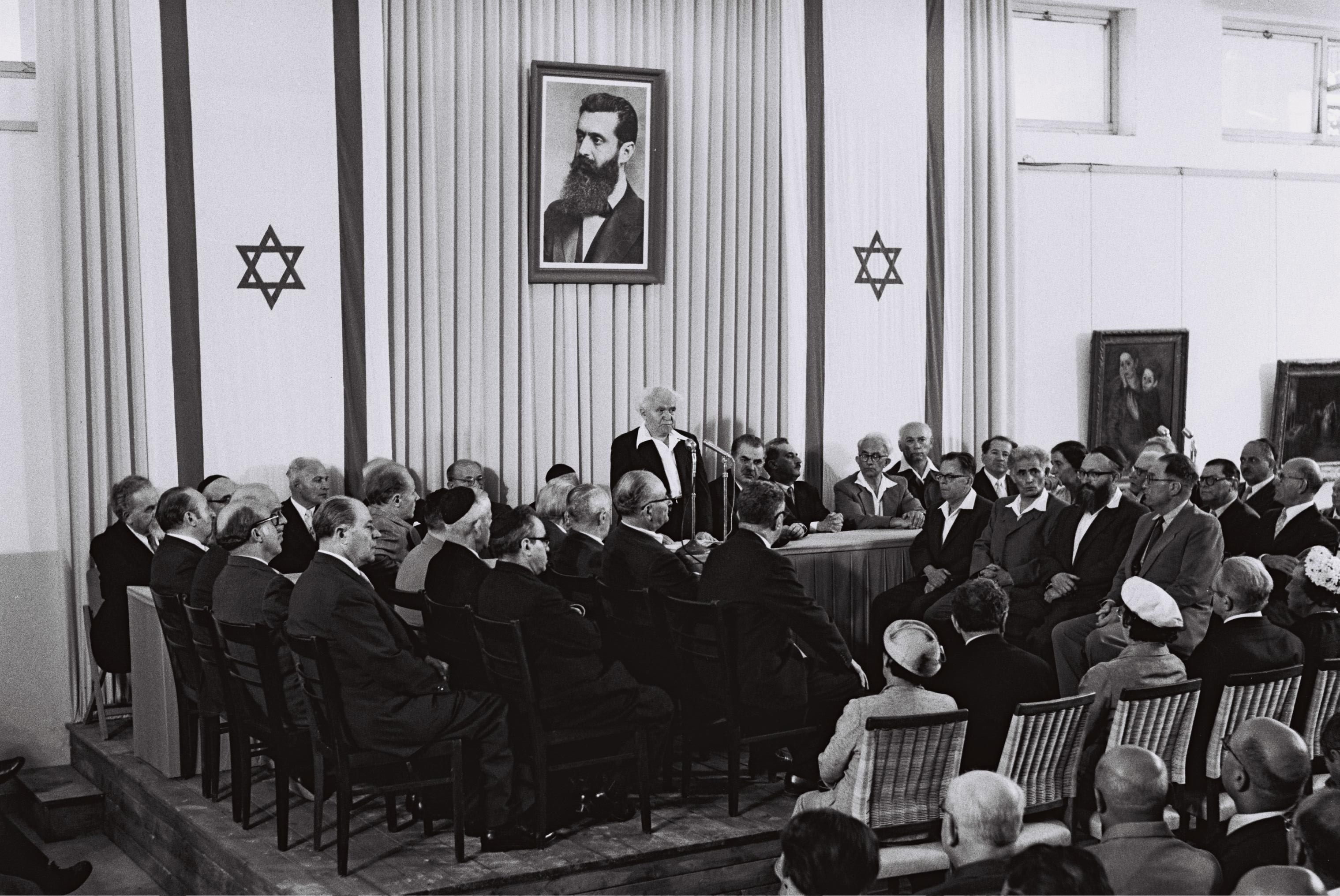 שחזור הכרזת העצמאות של מדינת ישראל במלאת עשור להכרזה